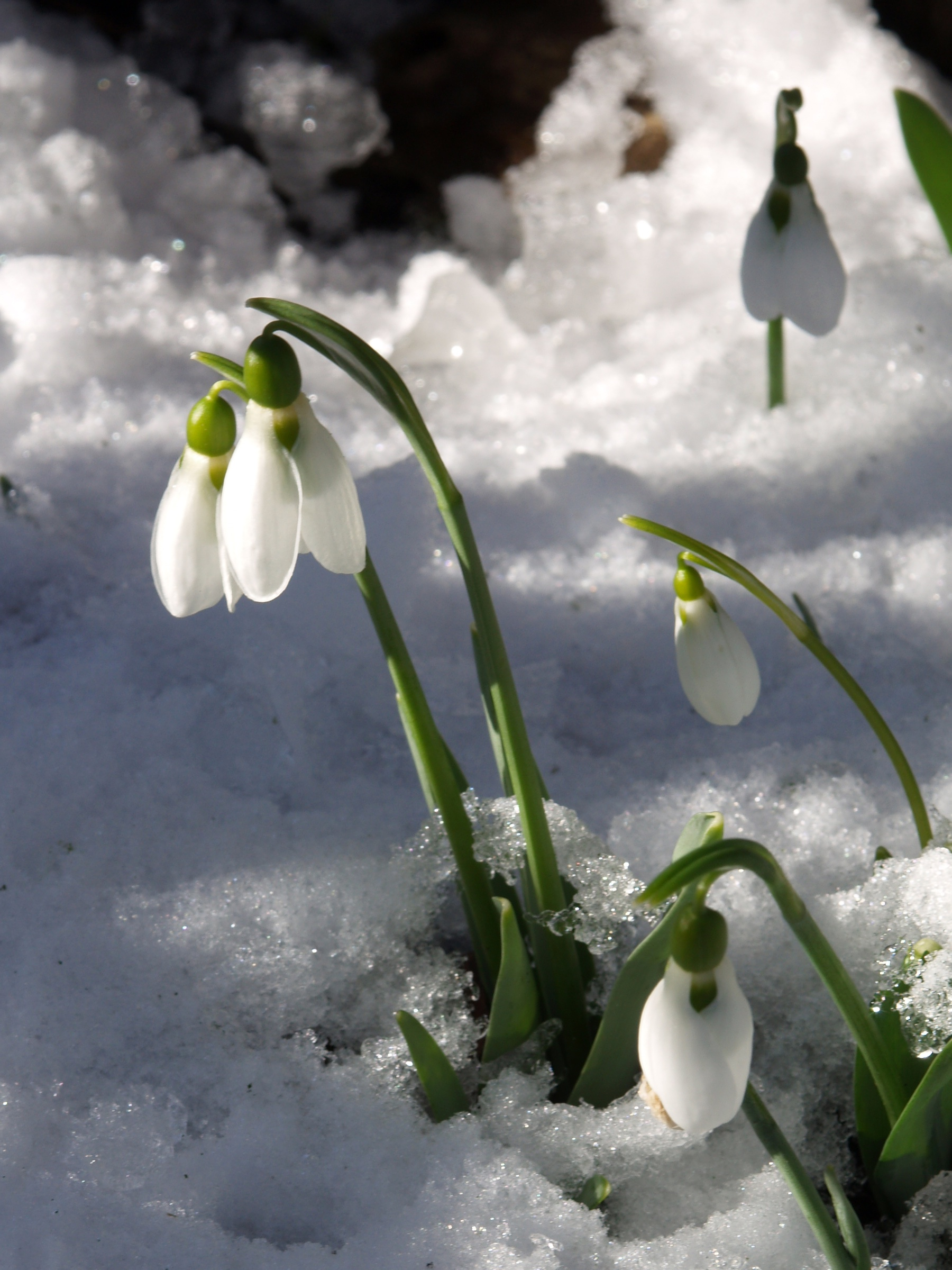 Aufnahmeort Paderborn